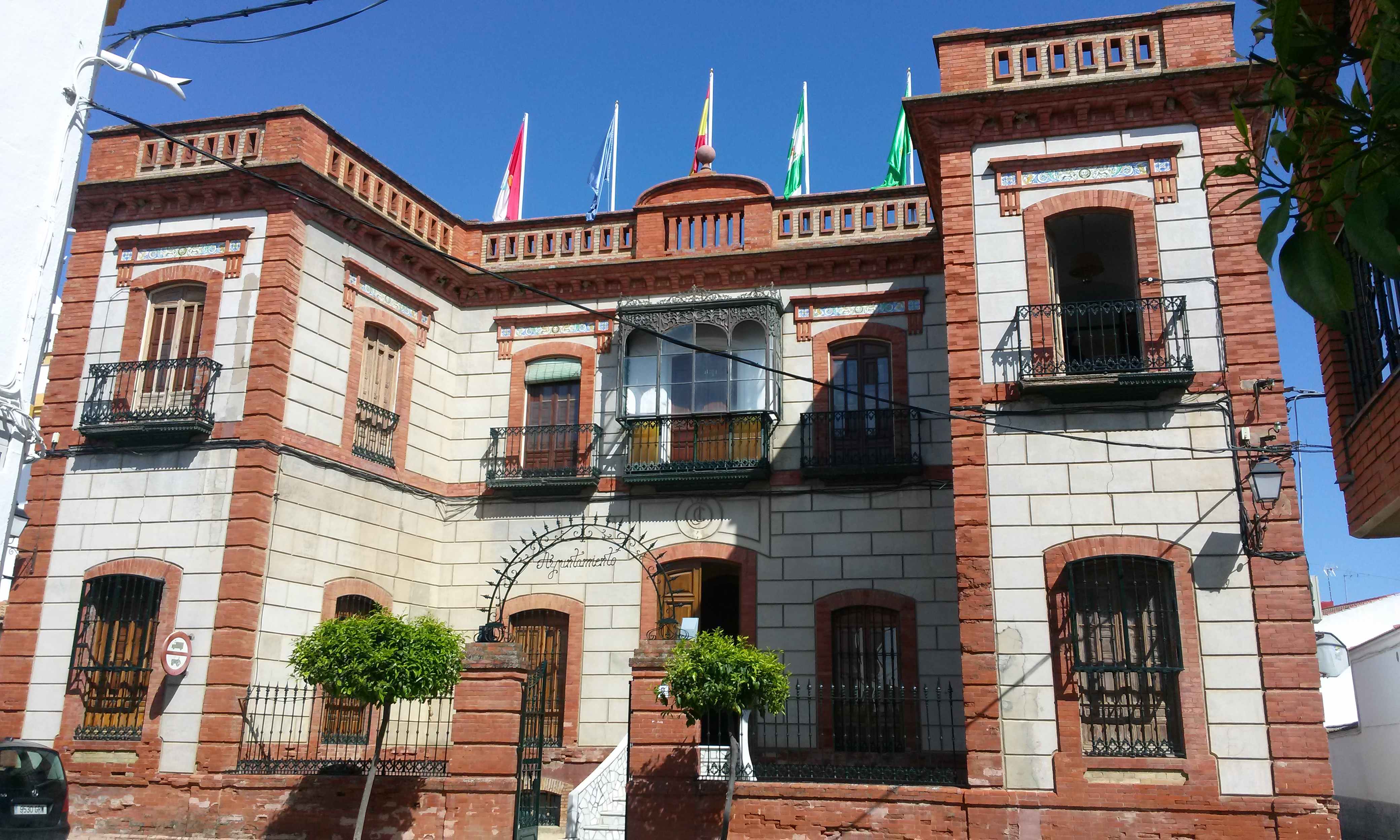 Fachada del ayuntamiento de Lahiguera.